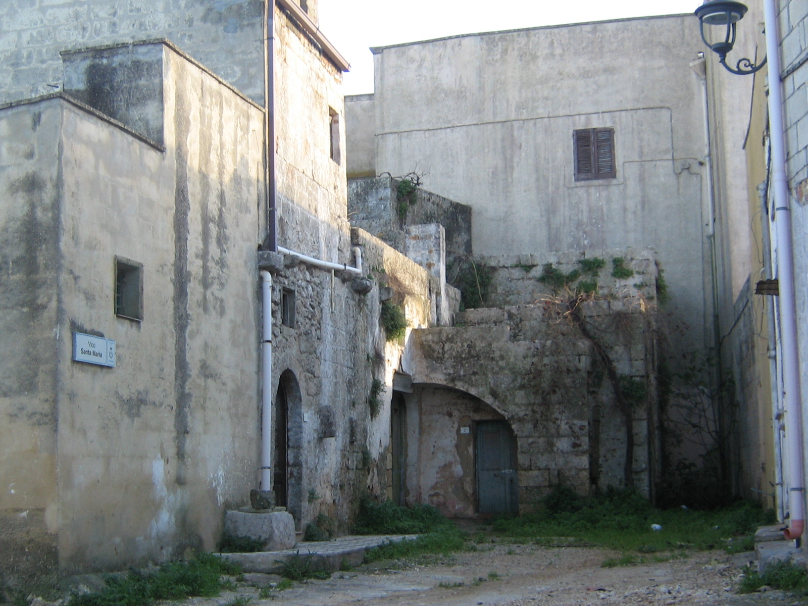 Corte a Tiggiano